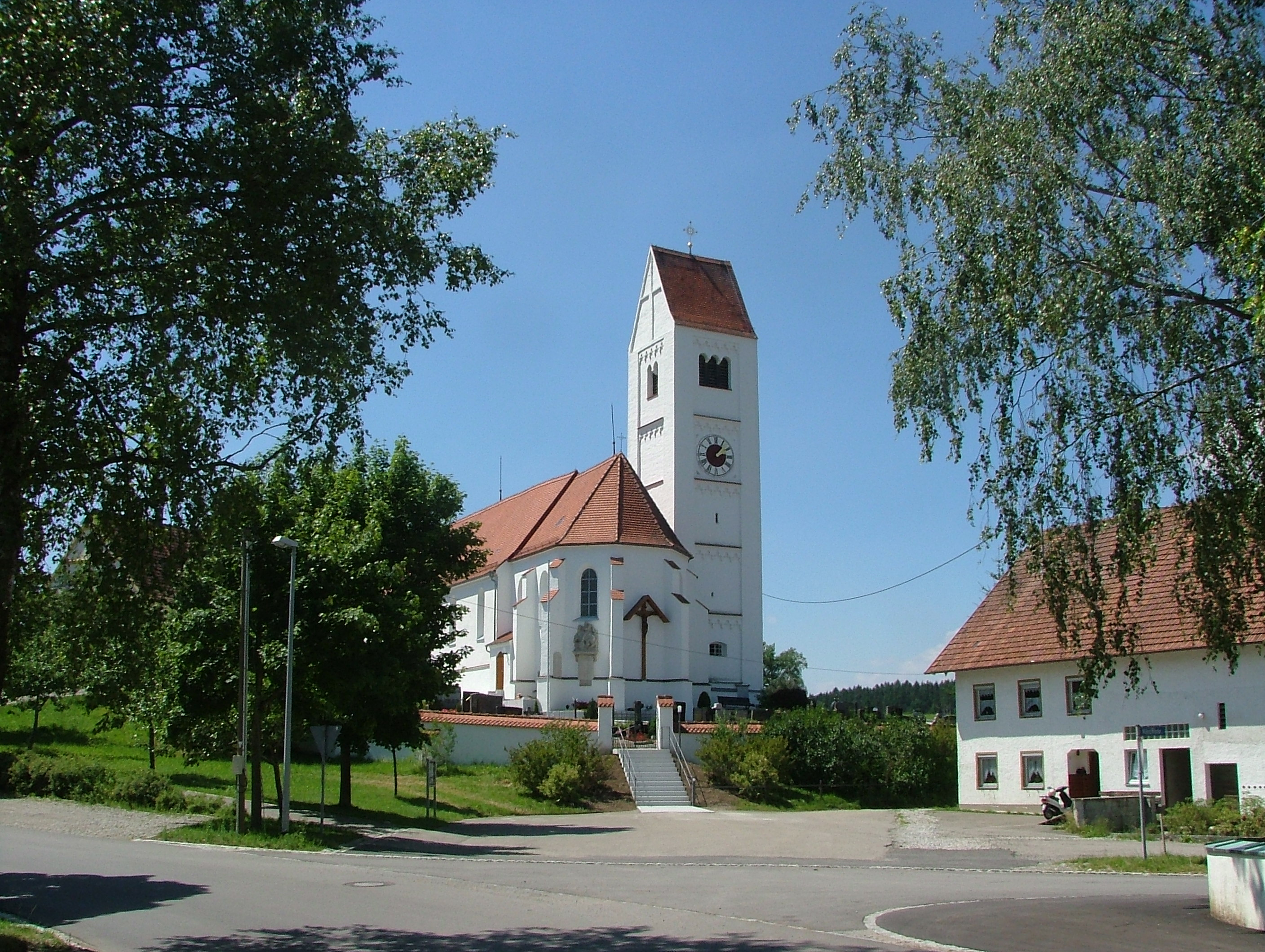 Attenhausen